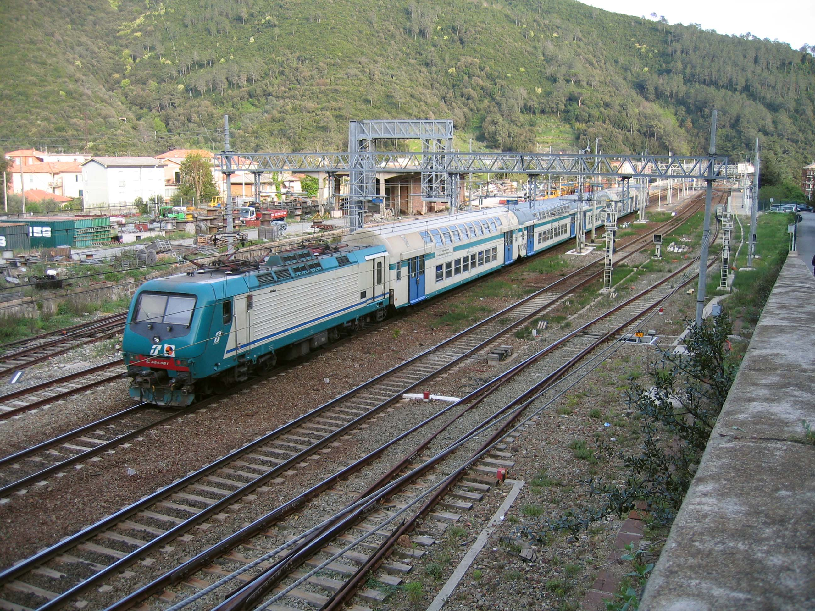 Treno regionale a Deiva Marina